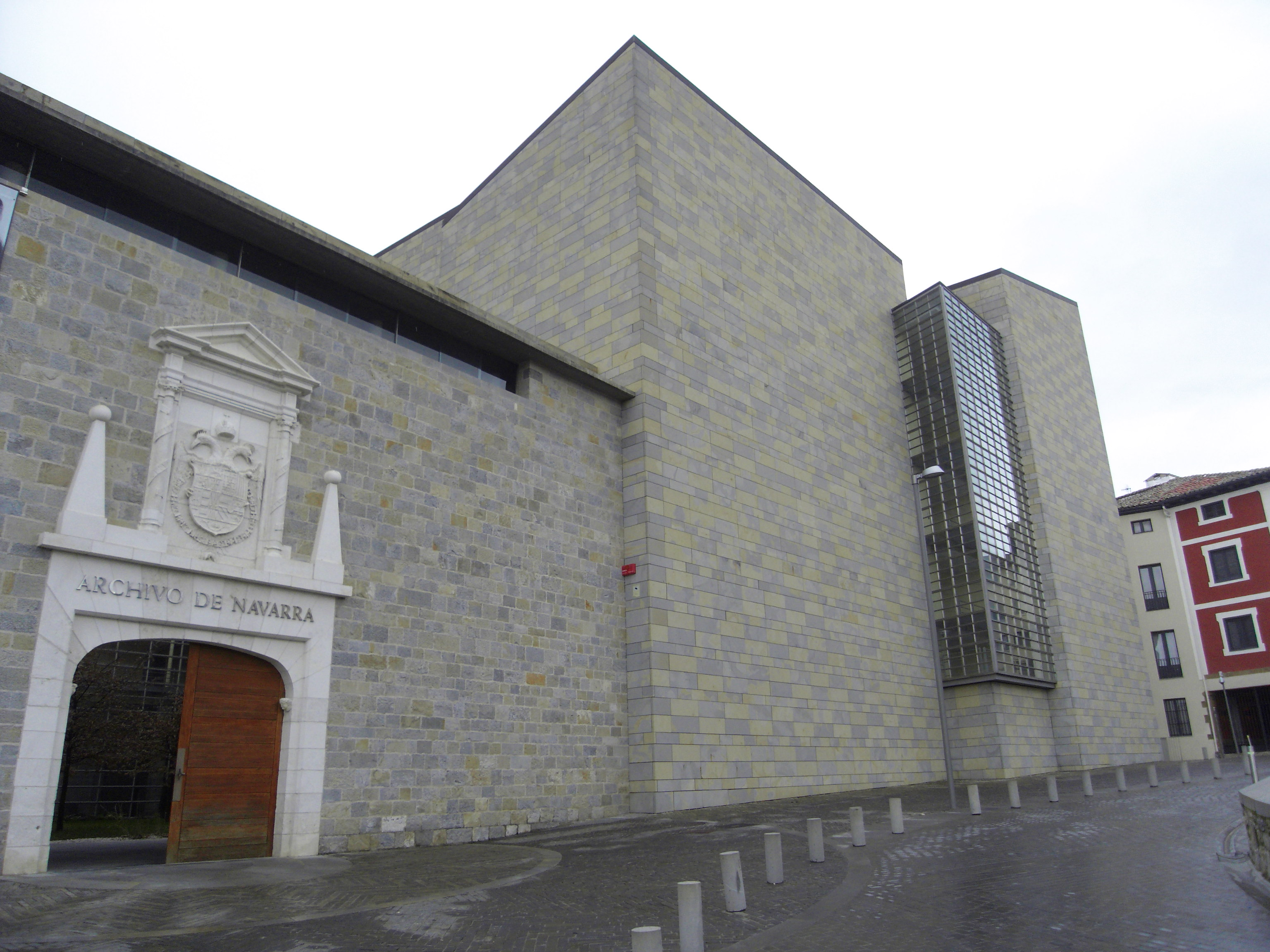 Nafarroako Agiritegi Orokorreko sarrera nagusia eta dorrea, Rafael Moneo arkitektoaren eraberritzearen ondoren (Iruñea, Nafarroa)